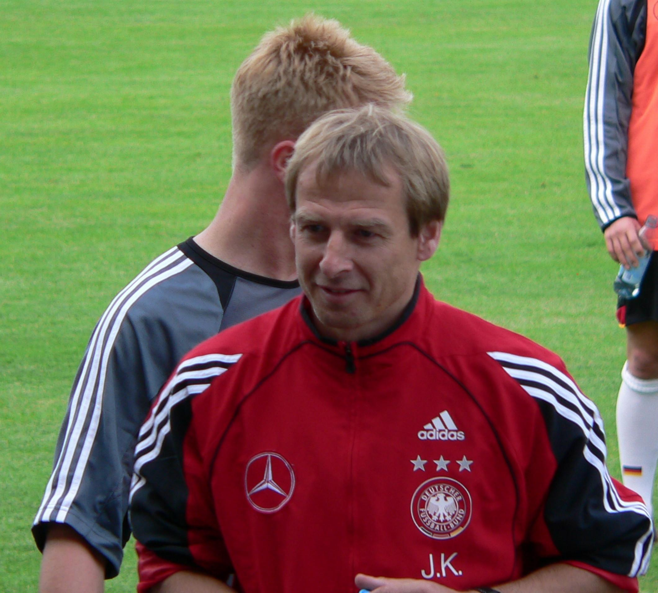 Jürgen Klinsmann in Frankfurt am Main im Juni 2005